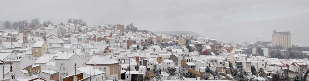 Vista del Saucejo. Provincia de Sevilla (España)